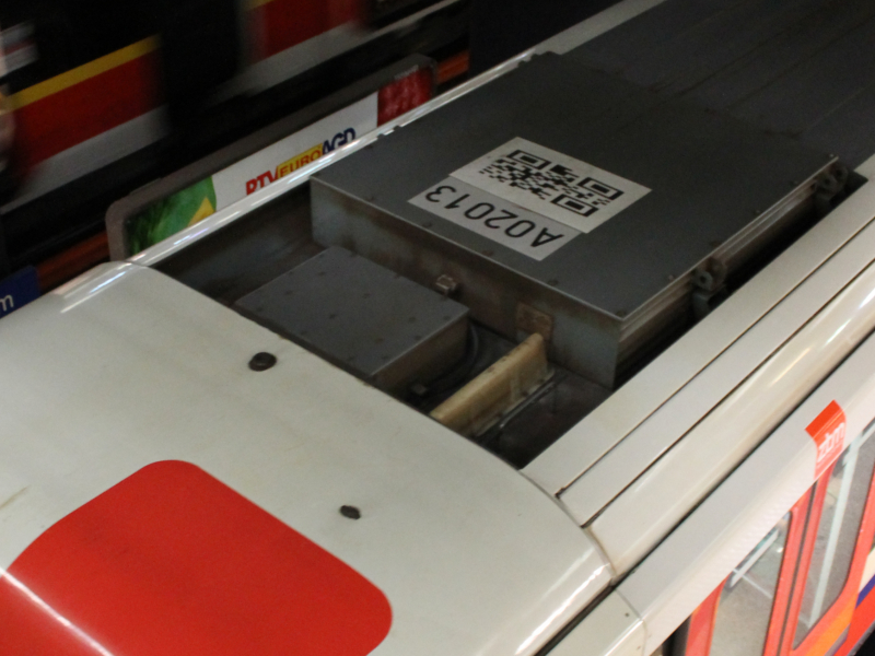 QR code na dachu elektrycznego zespołu trakcyjnego Alstom Metropolis 98B Metra Warszawskiego.